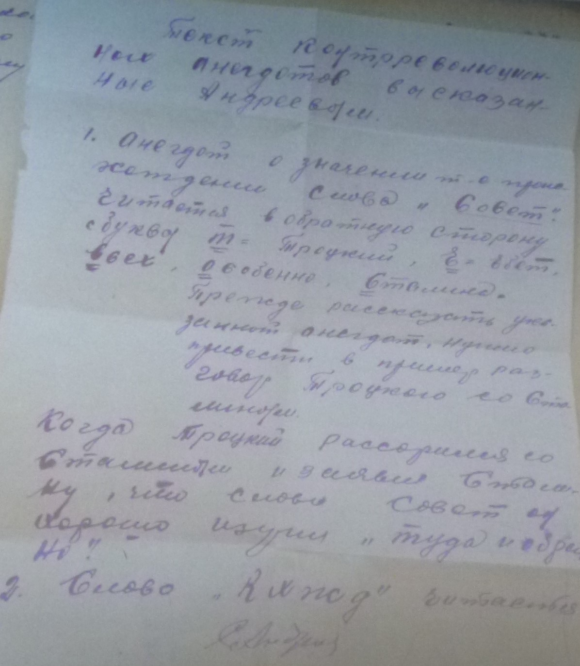 Анекдот о Сталине и Троцком из дела обвиняемого Андреева 1942 год Челябинский областной суд